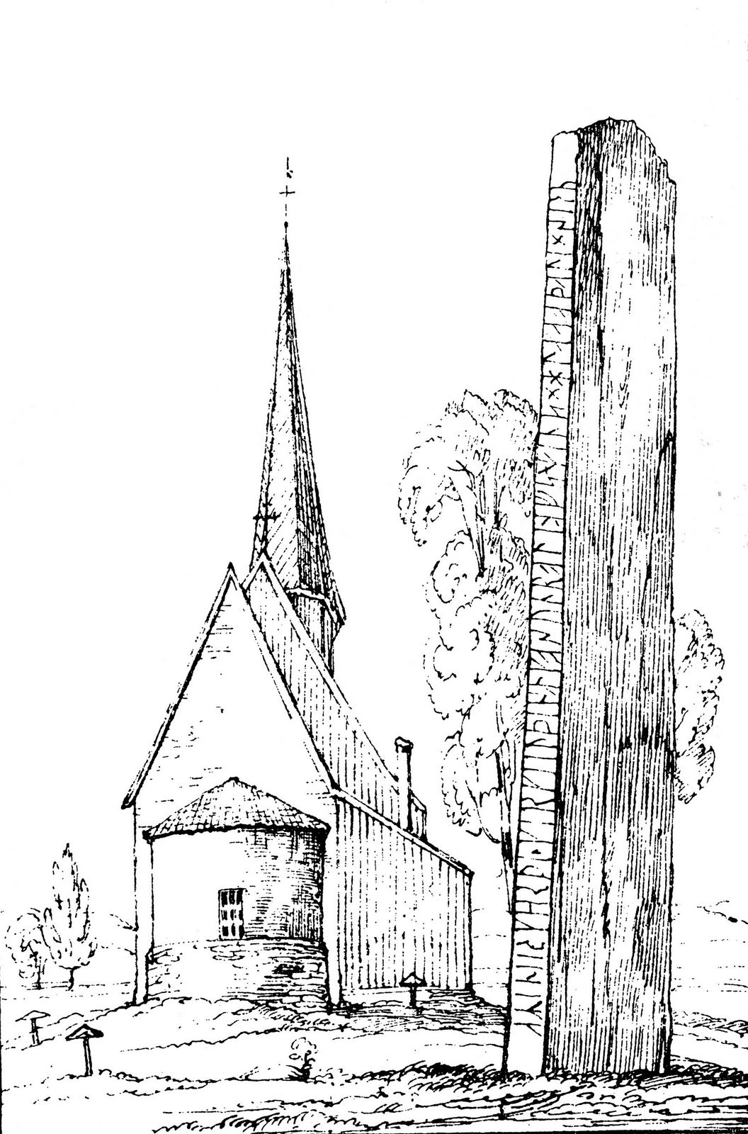 Oddernessteinen vid Oddernes kirke i Kristiansand, Vest-Agder.